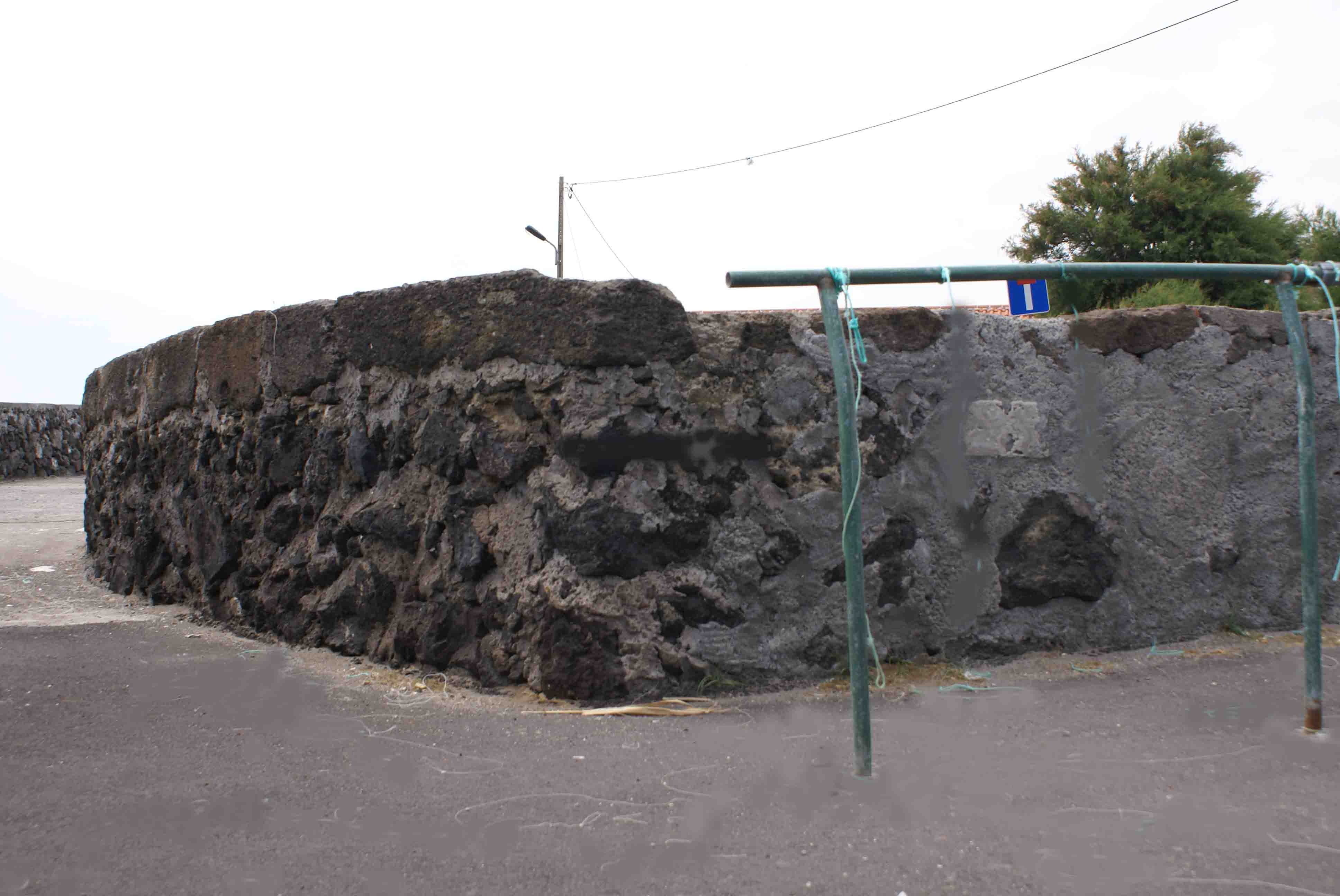 Forte do Biscoitinho, restos da antiga muralha, São Mateus da Calheta, ilha Terceira, Açores, Portugal.